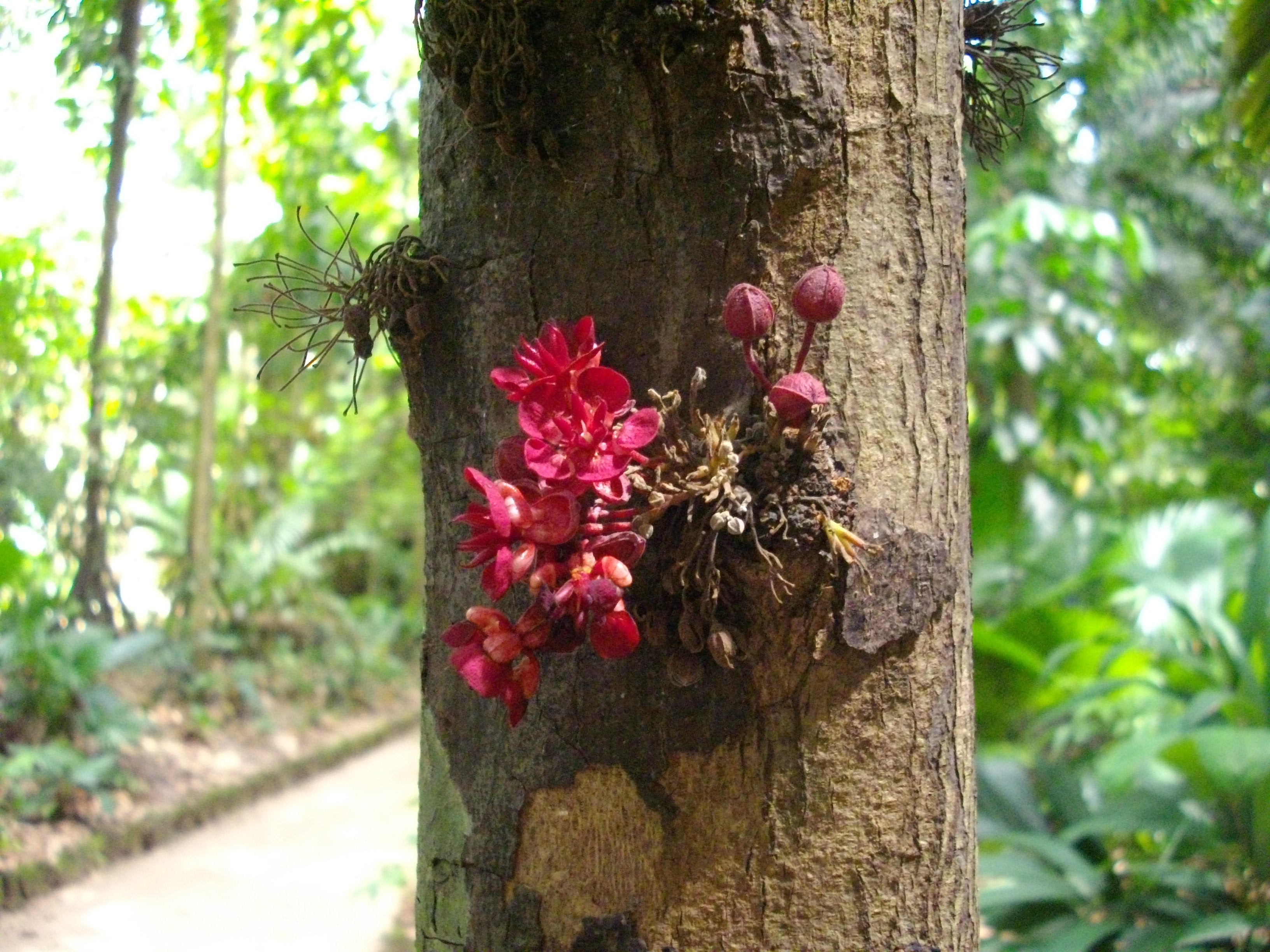 Cacho de flores de cacaueiroí, fotografado em 2010 no Museu Emílio Goeldi, Belém, Pará, Brasil.